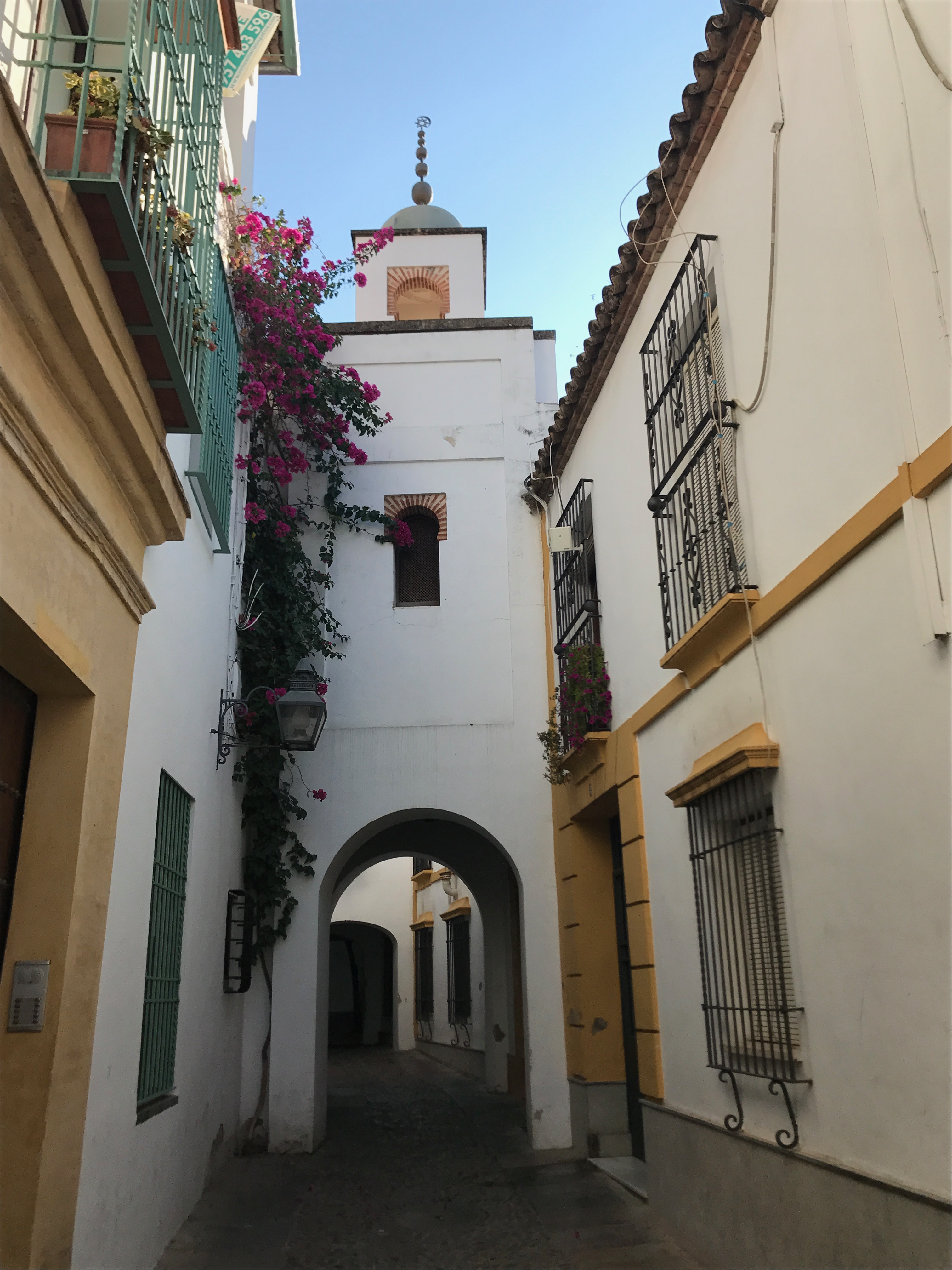 Mezquita de los Andaluces, Córdoba 2017.